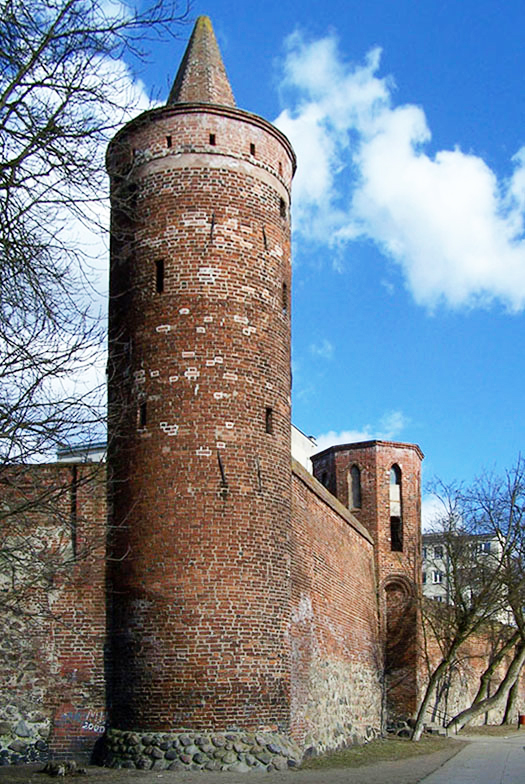 Baszta Prochowa z widoczną w tle Basztą Menniczą